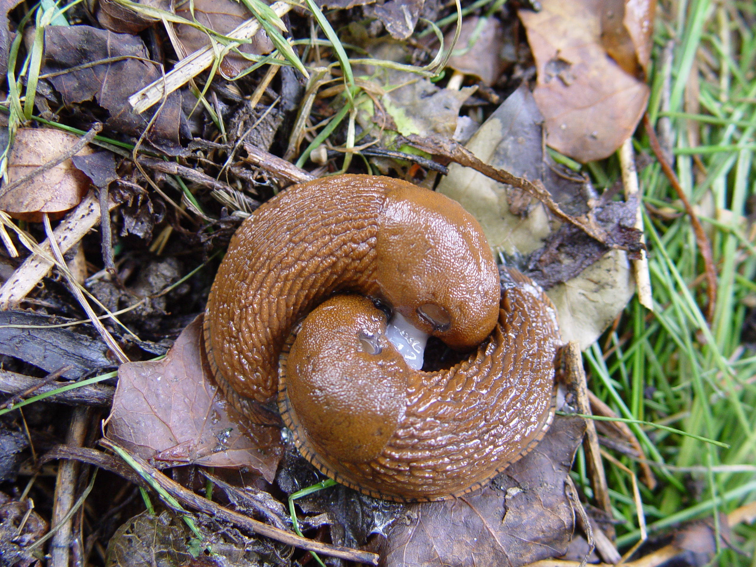 Nacktschnecken